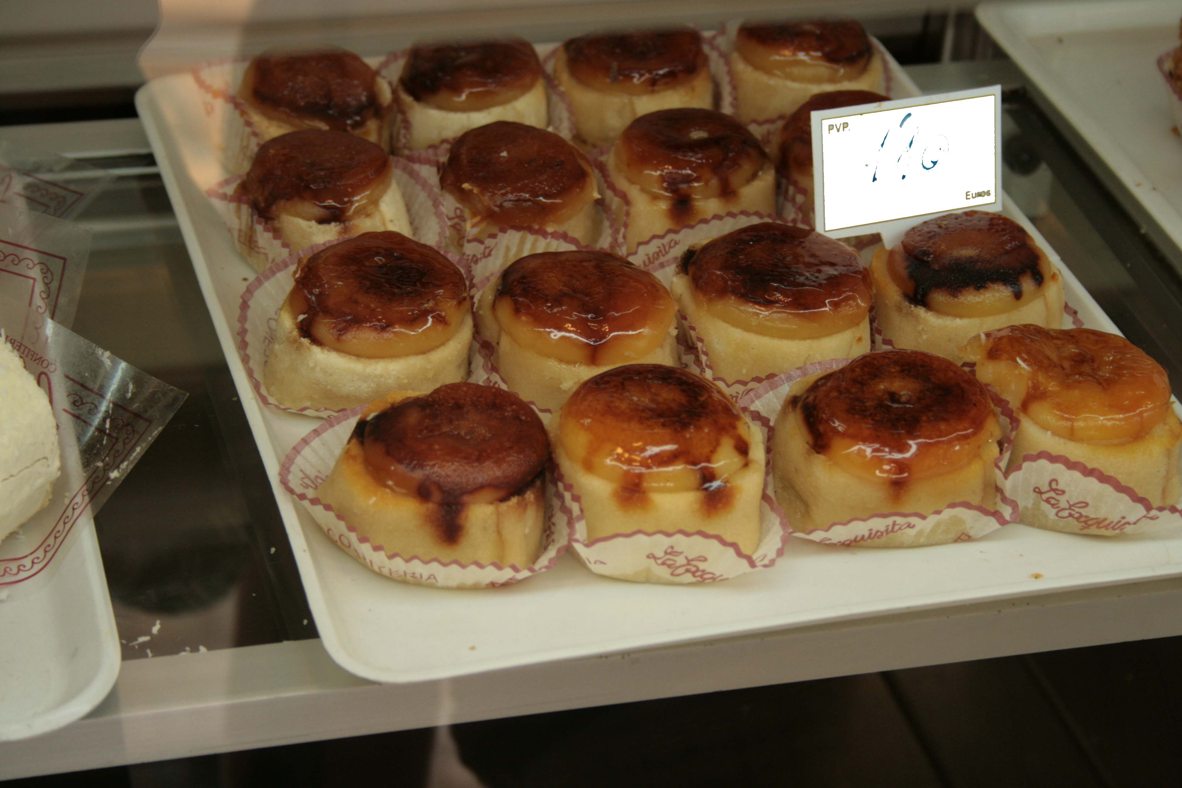 Pionono - Málaga